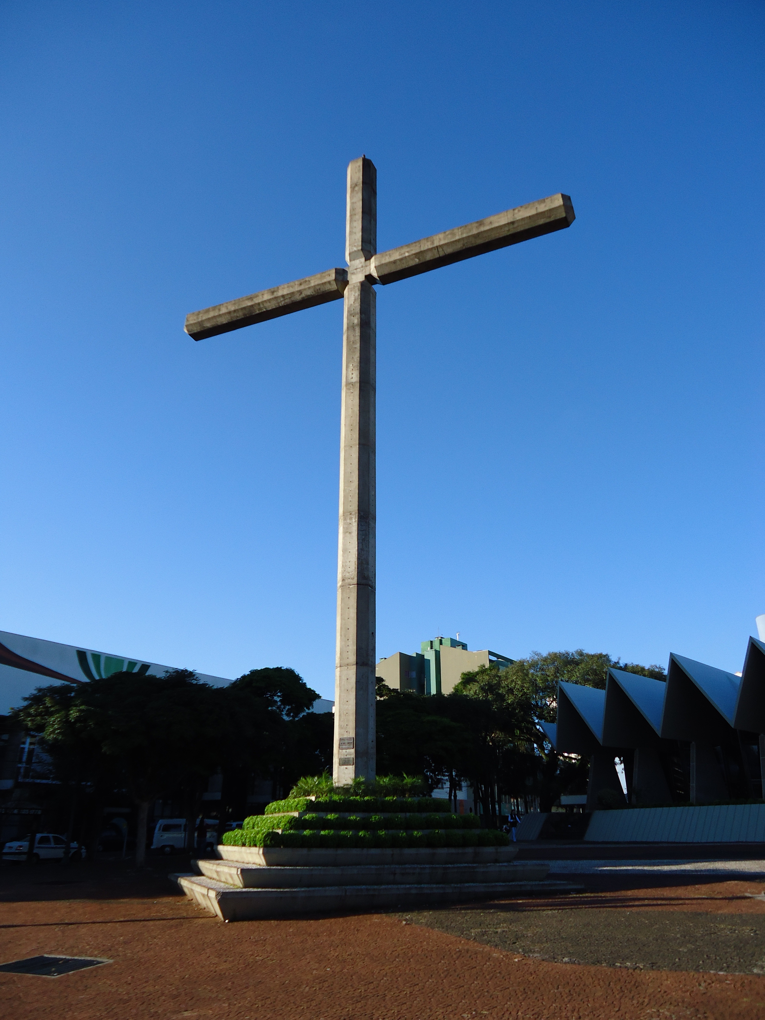 Catedral Nossa Senhora Aparecida - Cascavel - PR, Brasil. Cruz de concreto instalada defronte ao templo.